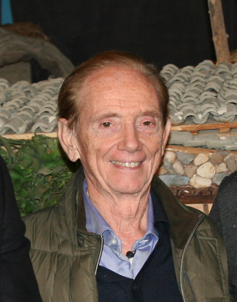 Osvaldo Bevilacqua, giornalista, autore televisivo e conduttore televisivo italiano. Immagine scattata a Torricella Sicura in provincia di Teramo, All'interno dell'allestimento del Presepe e Museo Etnografico " Genti della Laga" durante la registrazione di una puntata di Sereno Variabile.